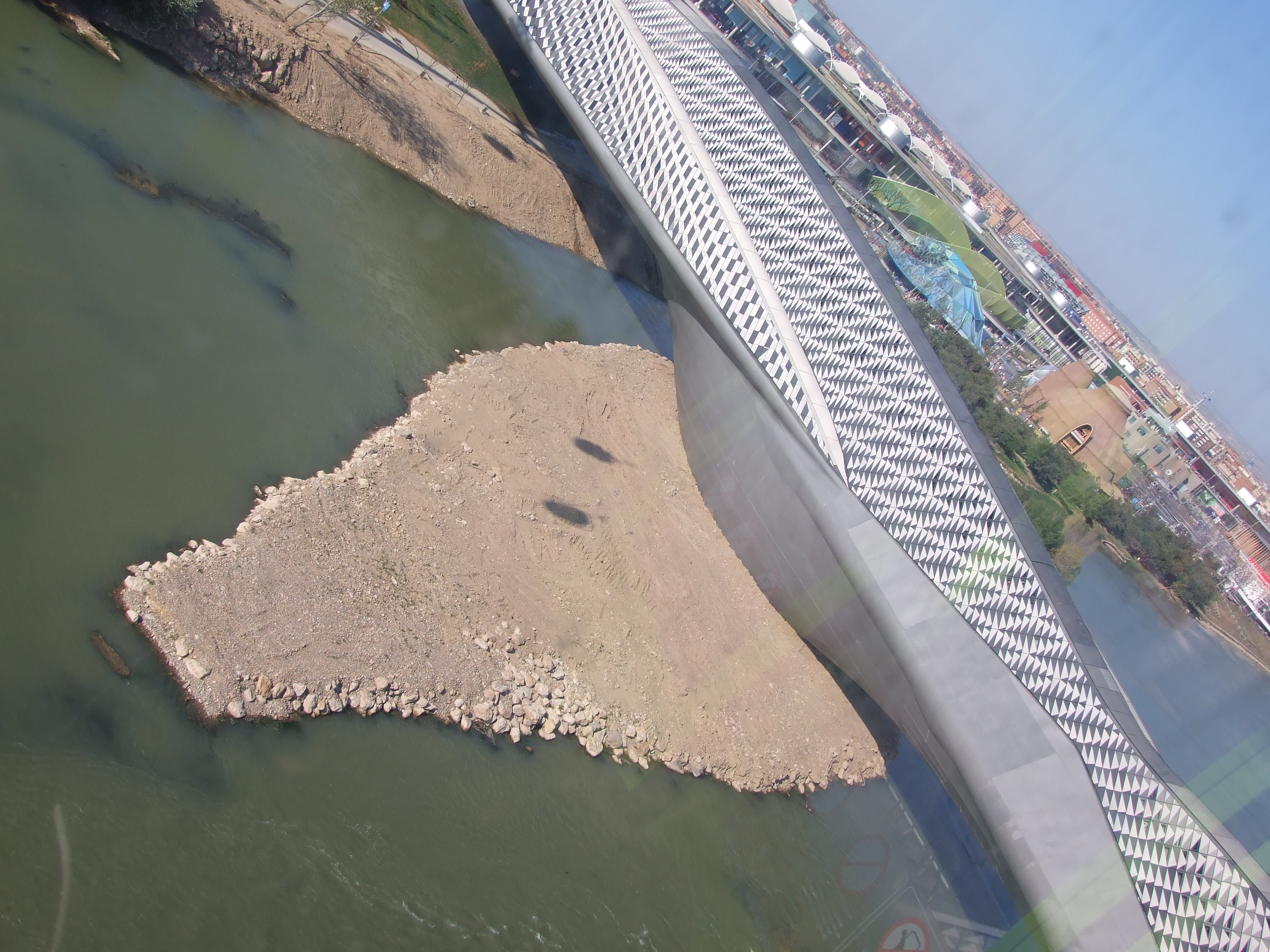 Aragonés: Mechana en o Pabillón Puent de Zaragoza